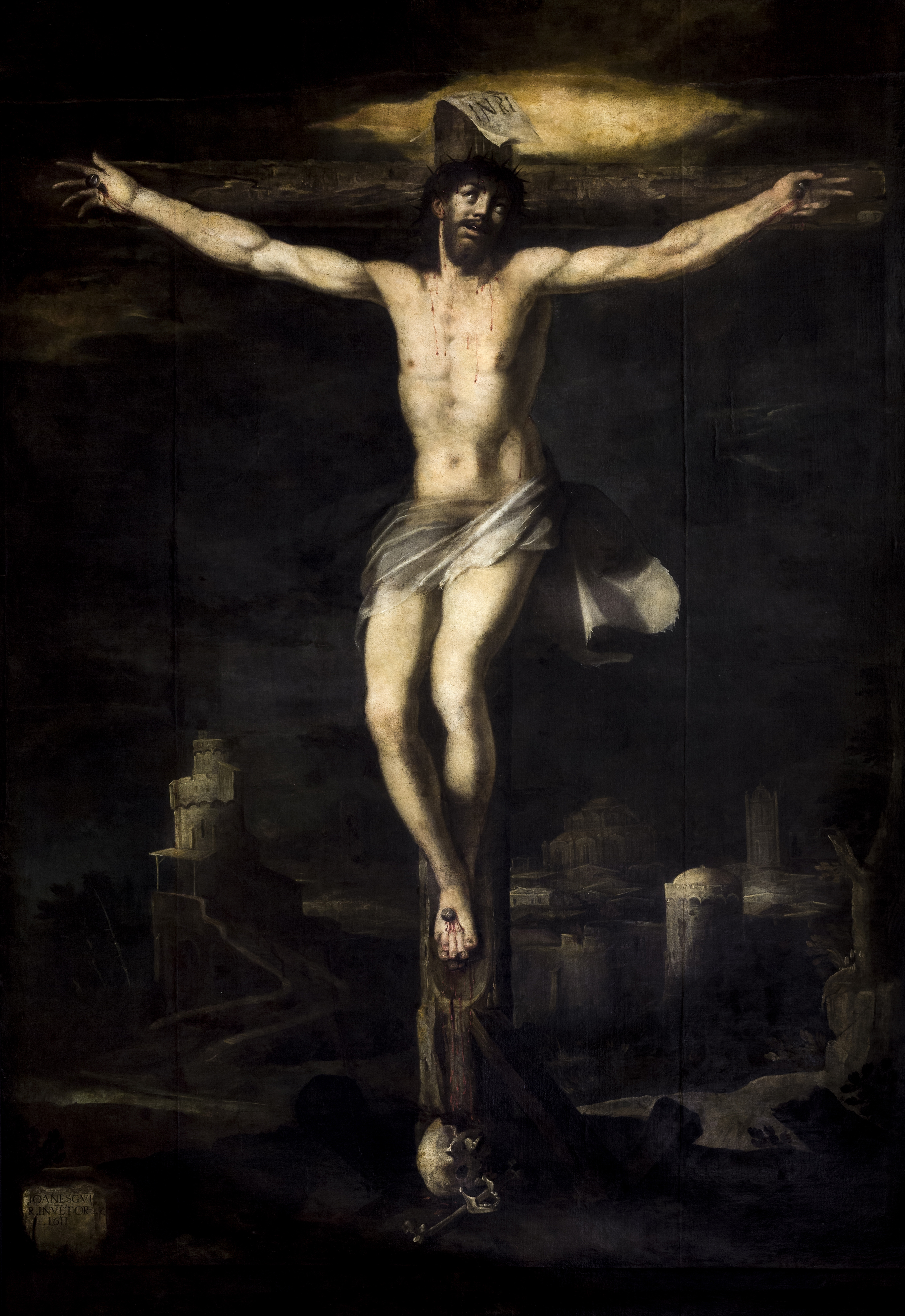 La obra representa a Jesucristo crucificado.